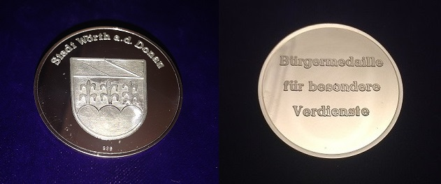 Bürgermedaille Stadt Wörth Donau